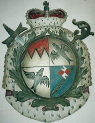 Wappen von Lobdeburg, Otto I. von Lobdeburg, Bischof von Würzburg (1207-1223) und Hermann I. von Lobdeburg, Bischof von Würzburg (1225-1254)